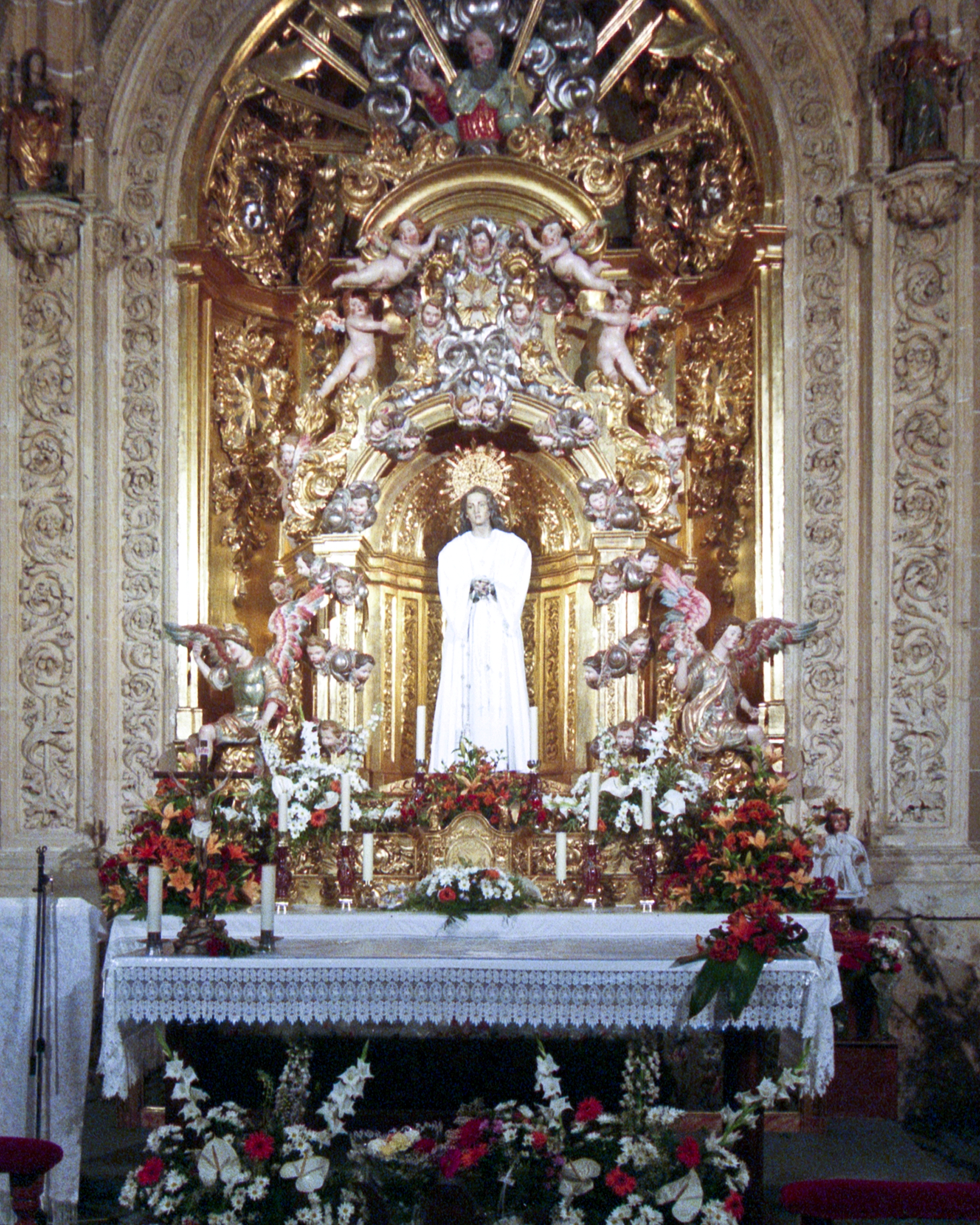 Capilla de la Soledad en tiempo de Pascua, Catedral Nueva, Salamanca.